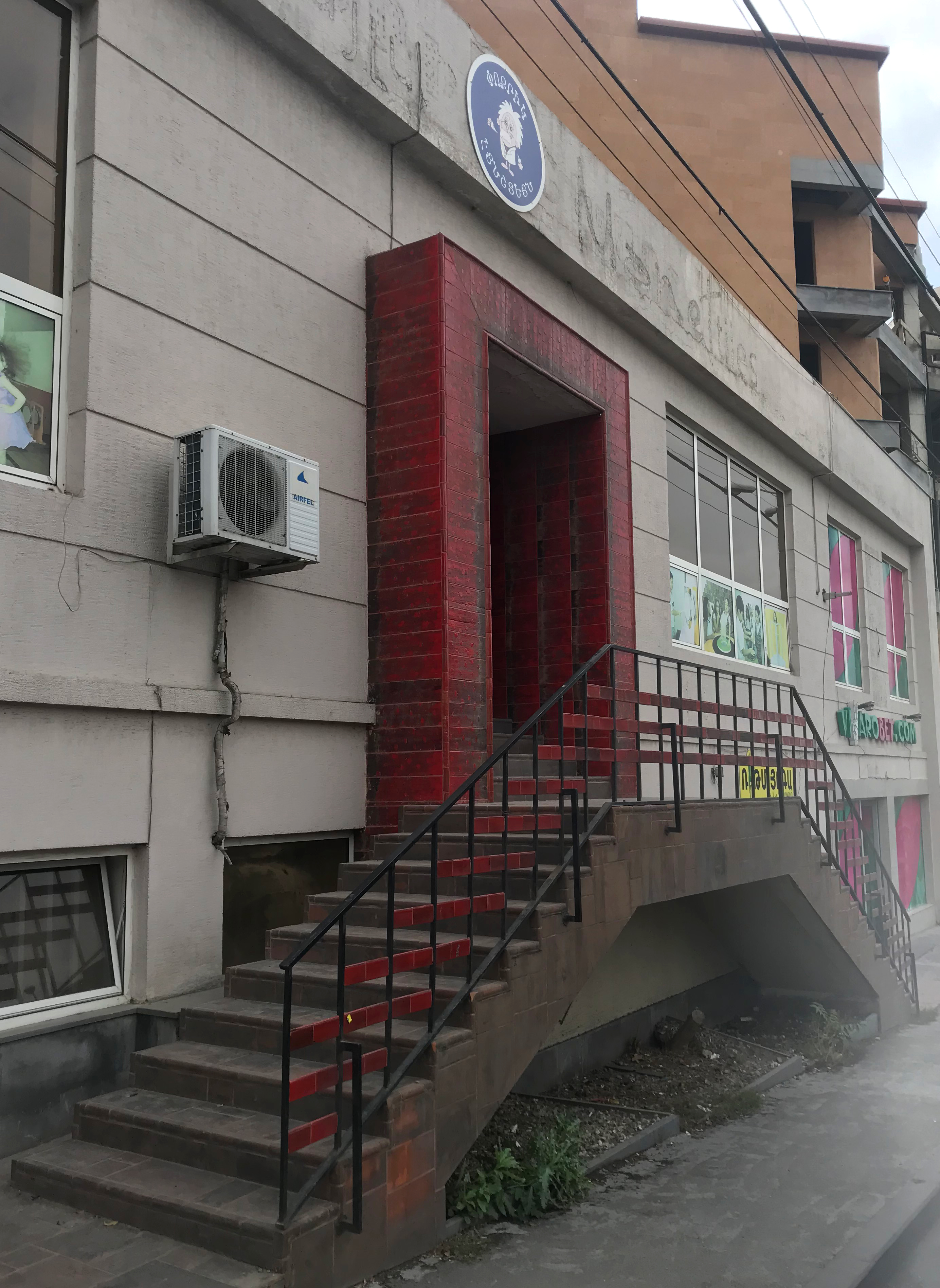 Musée Little Einstein, Erevan, Arménie.